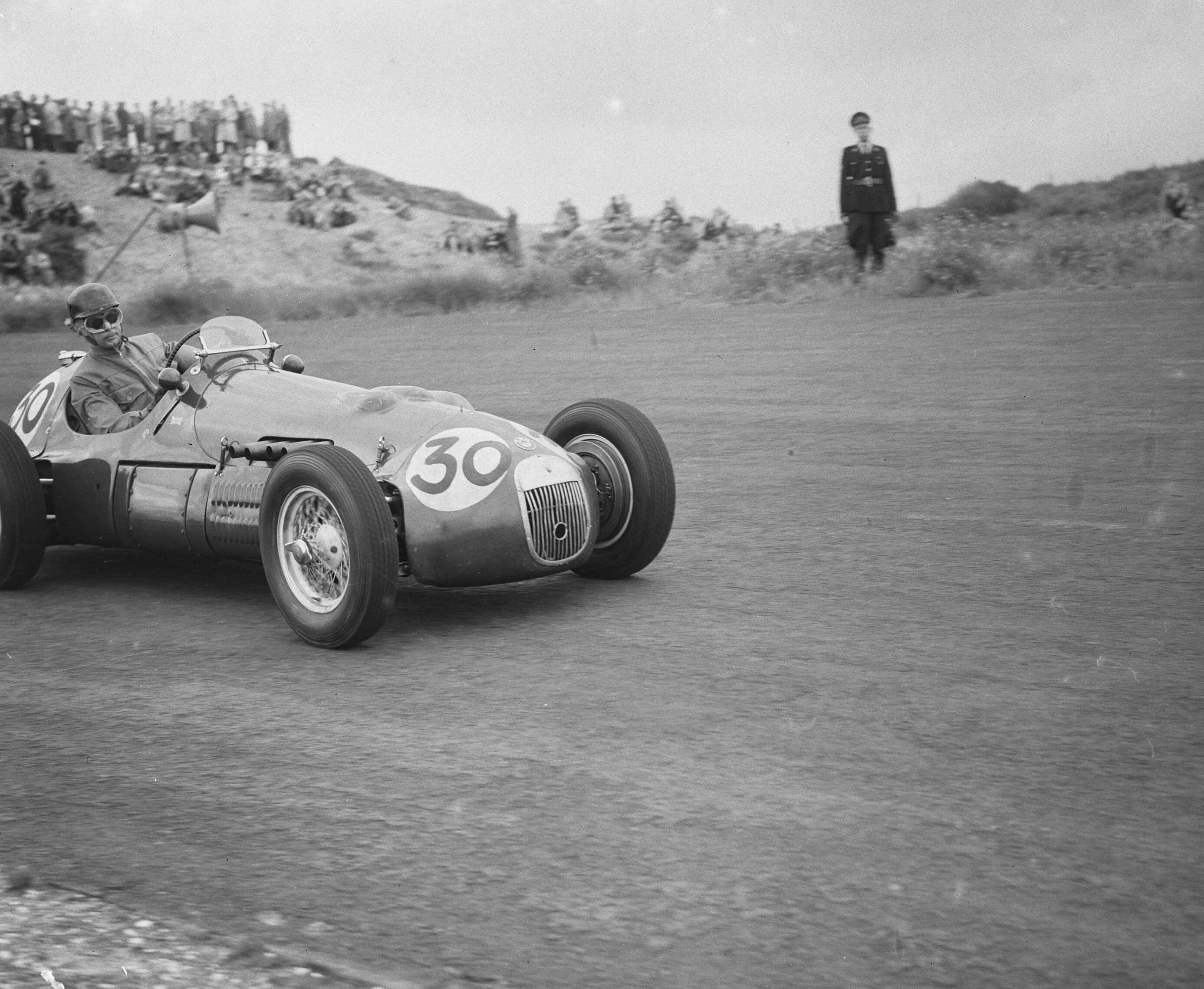 Collectie / Archief : Fotocollectie Anefo Reportage / Serie : [ onbekend ] Beschrijving : Grote Prijs Nederlandse autoraces Zandvoort. Finish Askari Datum : 17 augustus 1952 Locatie : Noord-Holland, Zandvoort Trefwoorden : AUTORACES, PRIJS, finishen Fotograaf : Bilsen, Joop van / Anefo Auteursrechthebbende : Nationaal Archief Materiaalsoort : Glasnegatief Nummer archiefinventaris : bekijk toegang 2.24.01.09 Bestanddeelnummer : 905-2693 Reacties Geplaatst door Luc Ghys op 02 september 2016 - 15:33. Dit is Dries Van Der Lof in een HWM 52